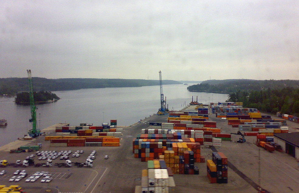 Hamnområde vid Södertälje kanal i Södertälje i Sörmland